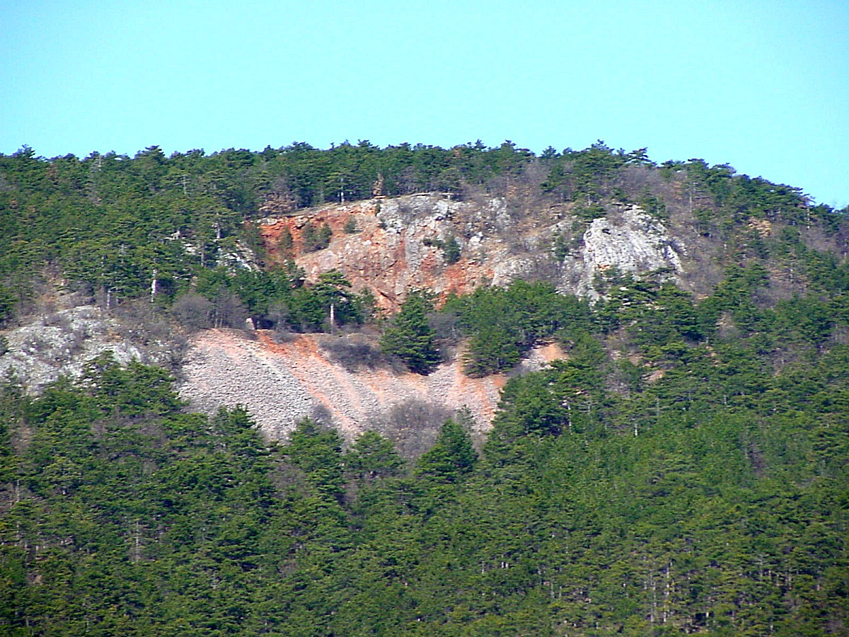 Engelsberger Marmorsteinbruch in Winzendorf (Bild 1)